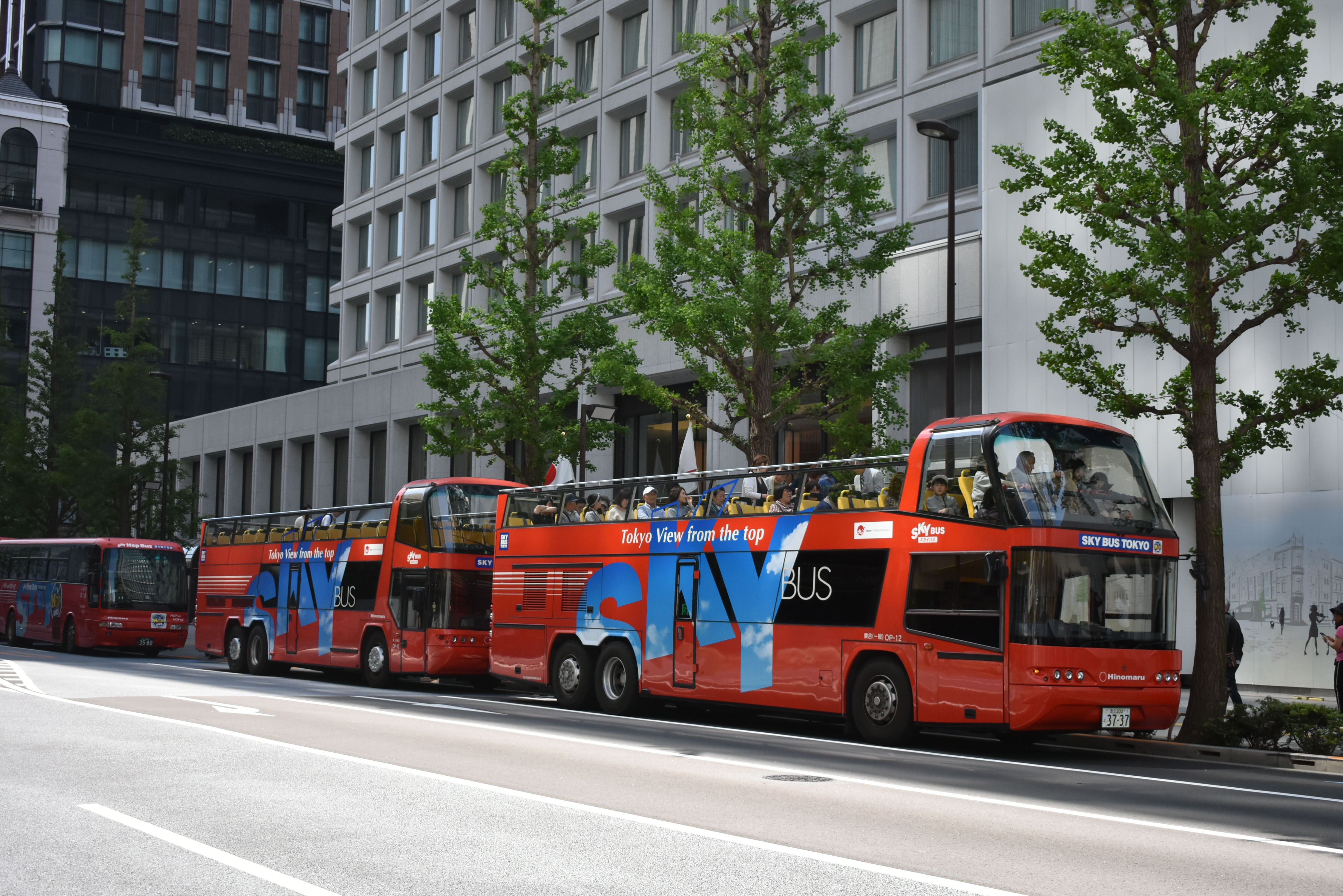 東京駅の丸の内南口近くにあるスカイバス乗り場。後方は三菱ビル。南西の方向を見る。地図はこちら。 Nikon D3400 Ik heb de GPS coördinaten toegevoegd. De foutenmarge moet tussen ±10 meter liggen. --トトト (talk) 07:23, 14 May 2019 (UTC)